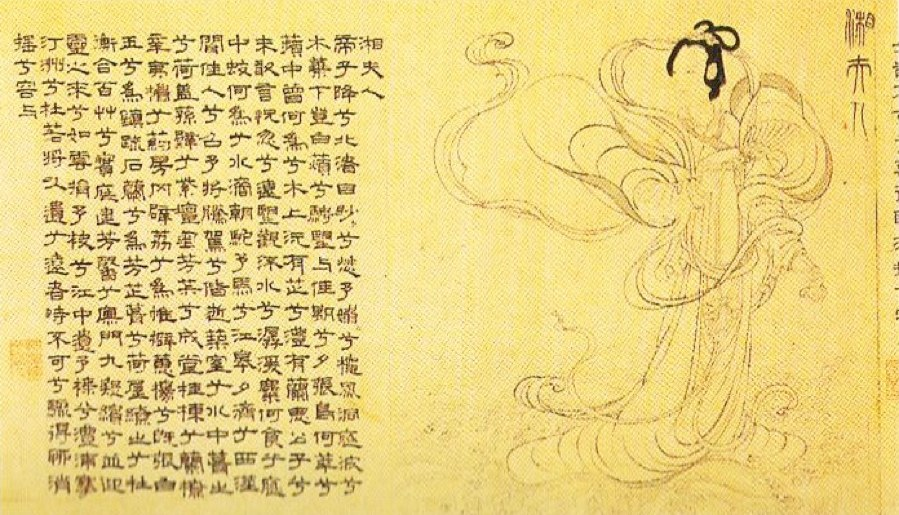 La dame de la rivière Xiang par le peintre chinois Zhang Wu, section d'un rouleau portatif, encre sur papier, daté 1346. 29x523,5 centimètres. Musée provincial de Jilin, Changchun.